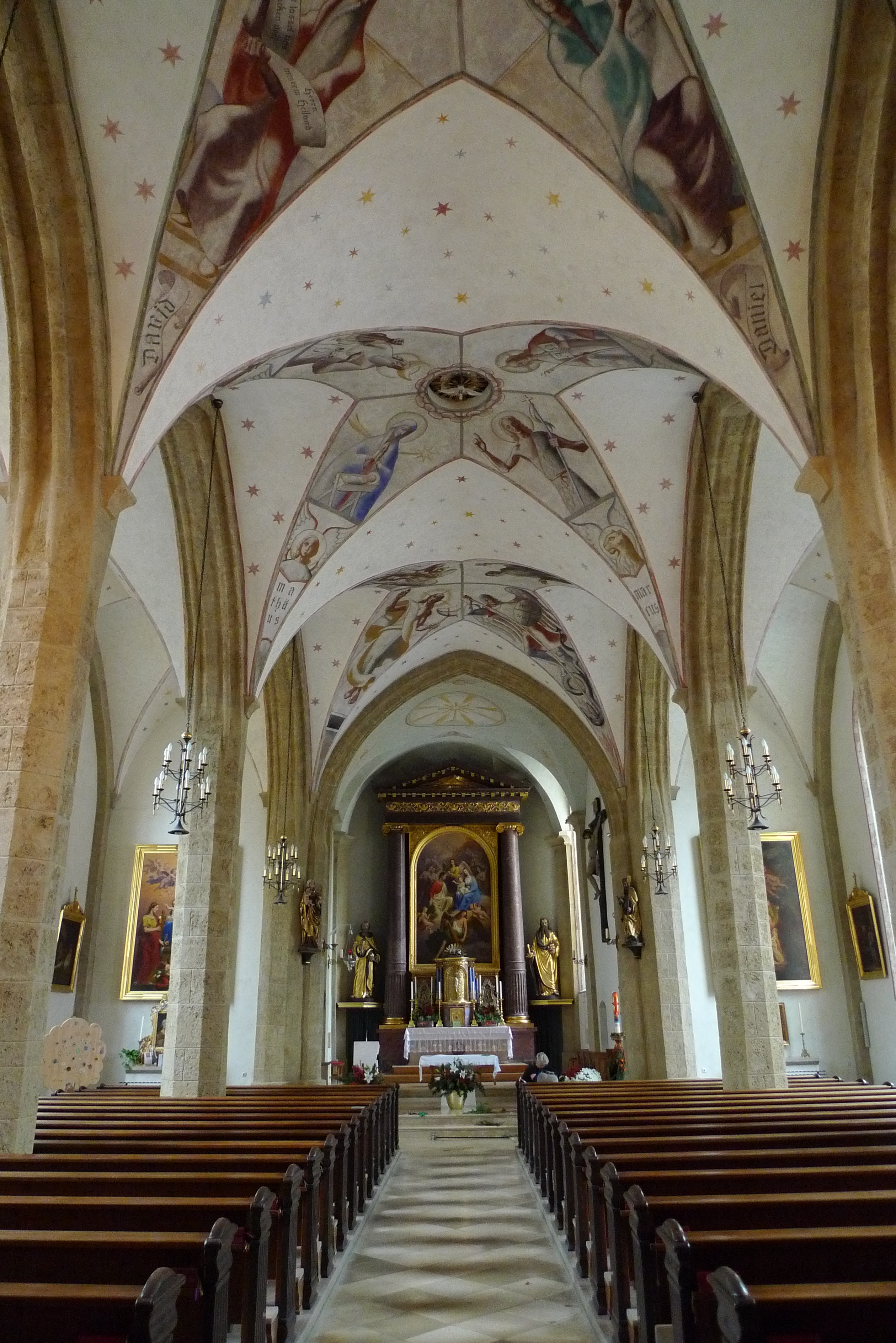 Stadtpfarrkirche St. Vitus, Kufstein 2